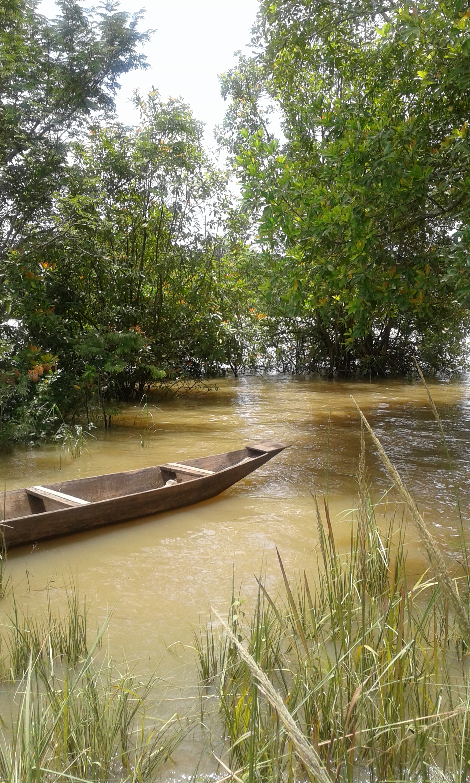 La mare aux crocodiles de Mbella Assom située sur la route de ngaoundéré